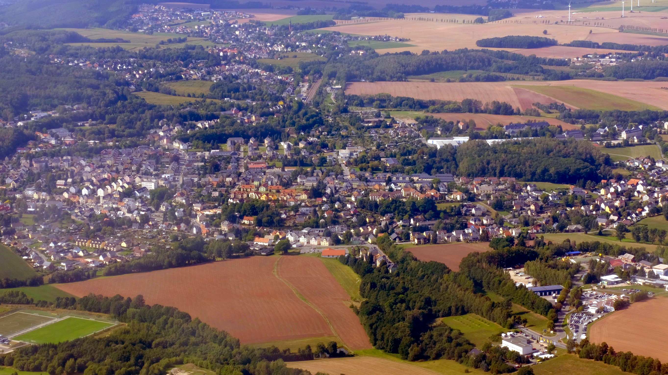 Oelsnitz aus dem Flugzeug